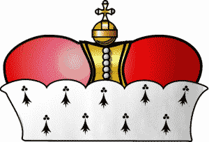 Kurhut modern